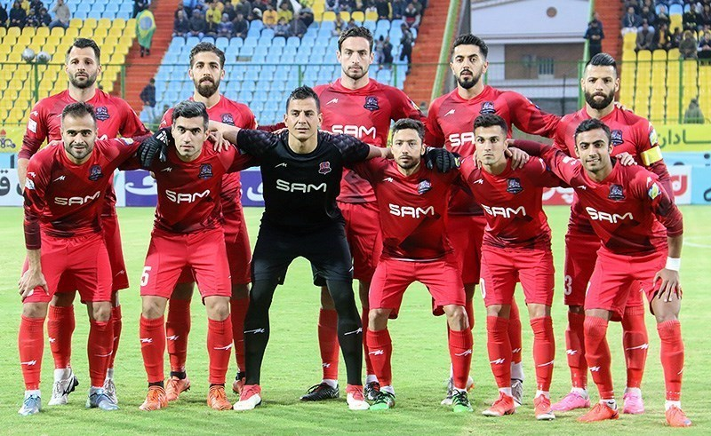 مازِرونی: نساجی و آبادان ِصنعت‌نفت فوتوال کا. فصل 97-98 شنه.